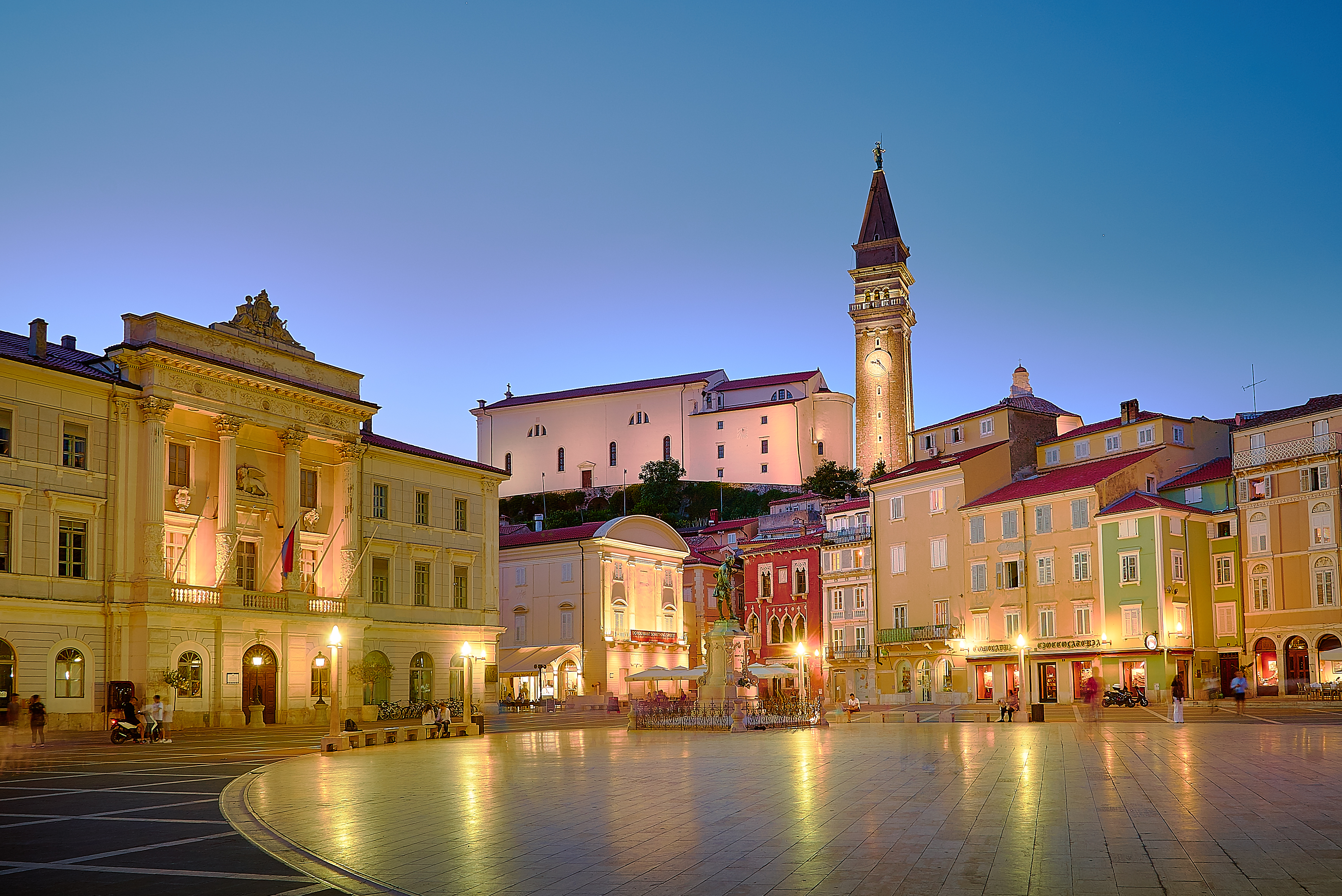 Main square